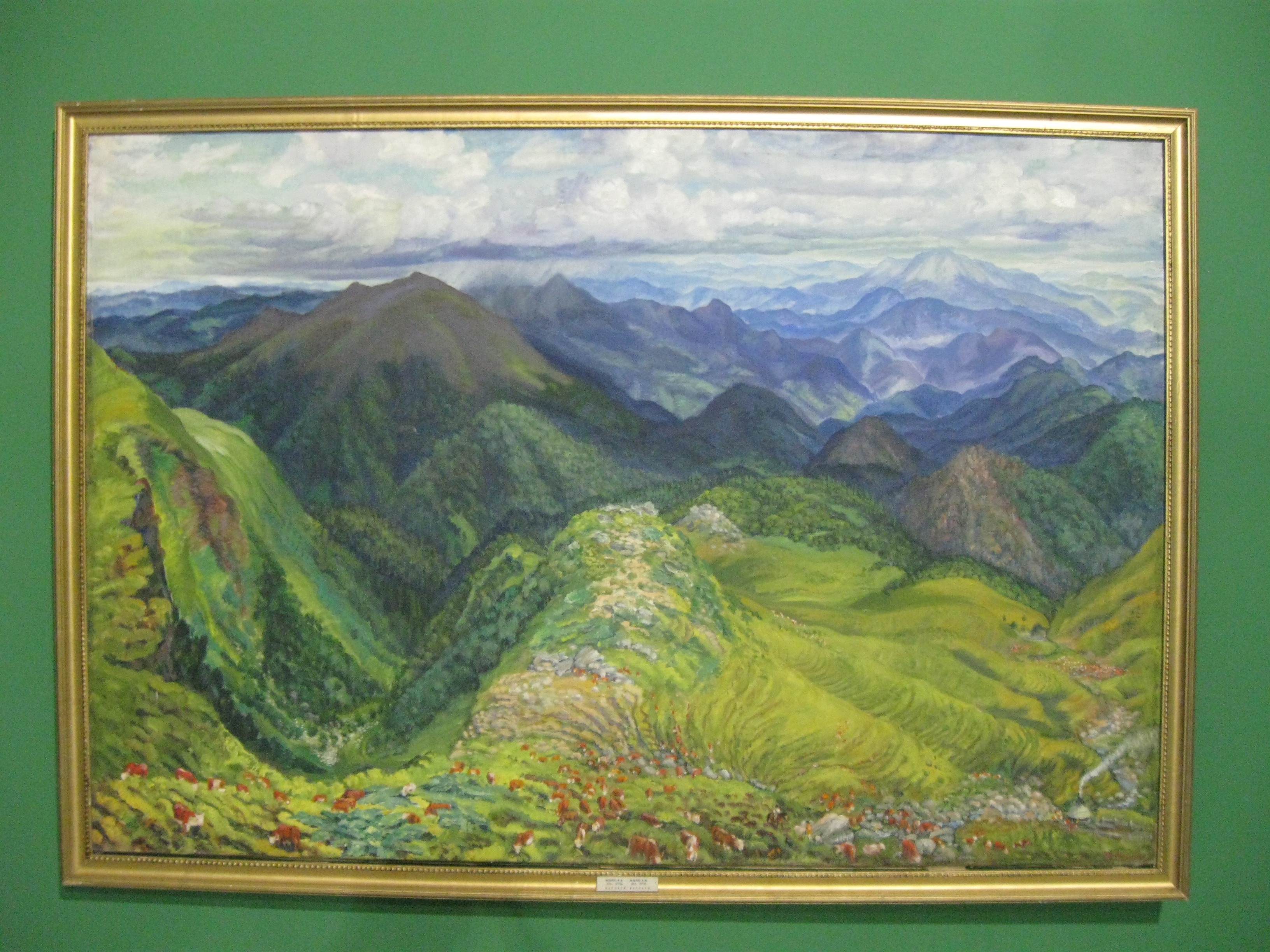 Федір Манайло. "Карпати" (1940-і рр., полотно, олія. Полтавський художній музей ім. Миколи Ярошенка) Виставка "Велике і Величне". Мистецький арсенал. 2013